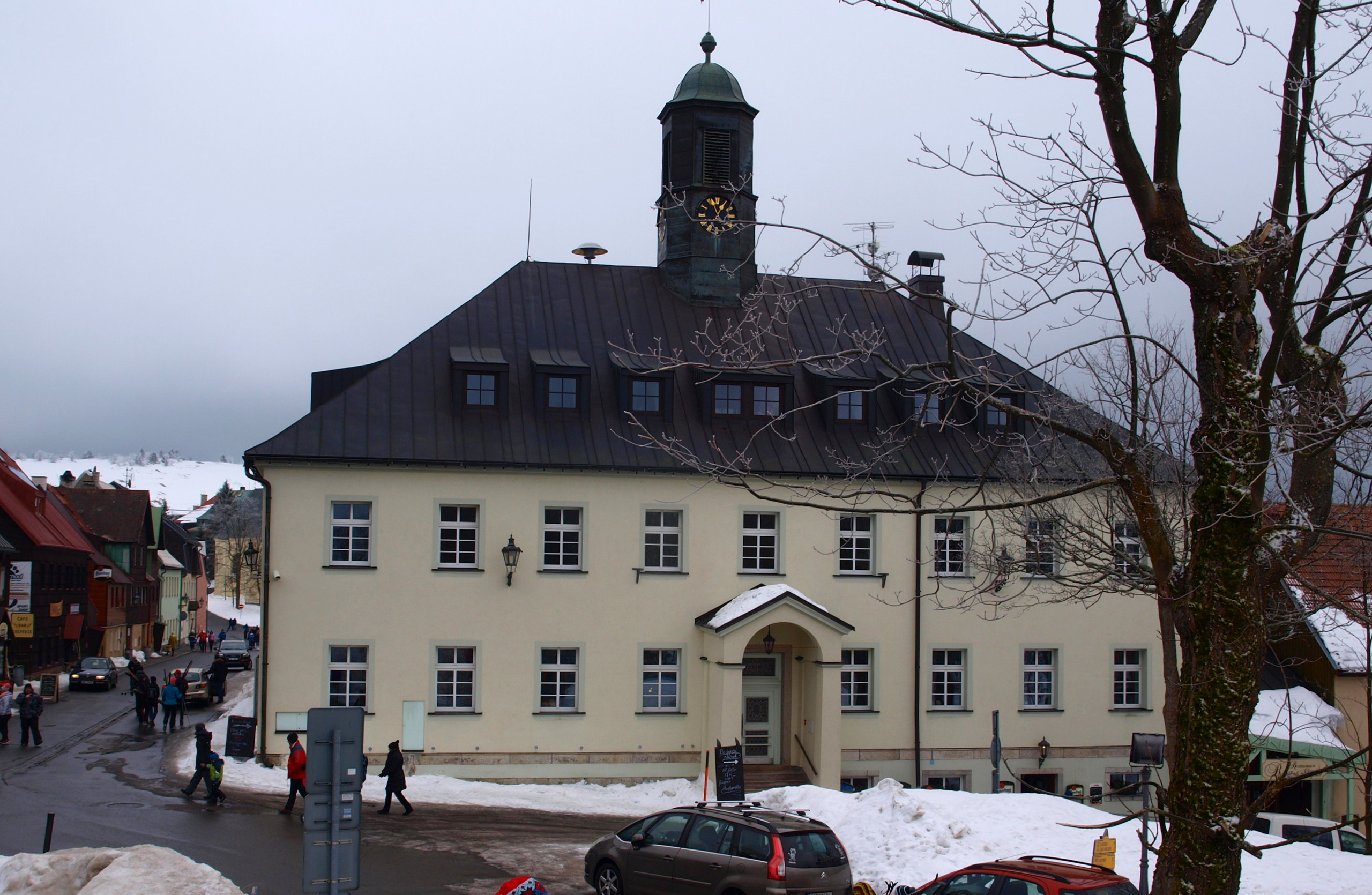 Boží Dar